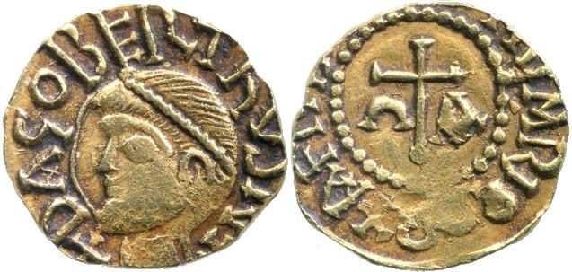 Trémissis de Dagobert Ier. BNF, onnaies, médailles et antiques. Avers : Buste diadémé à gauche. Revers : Croix accostée des lettres C et A, dans un grènetis.